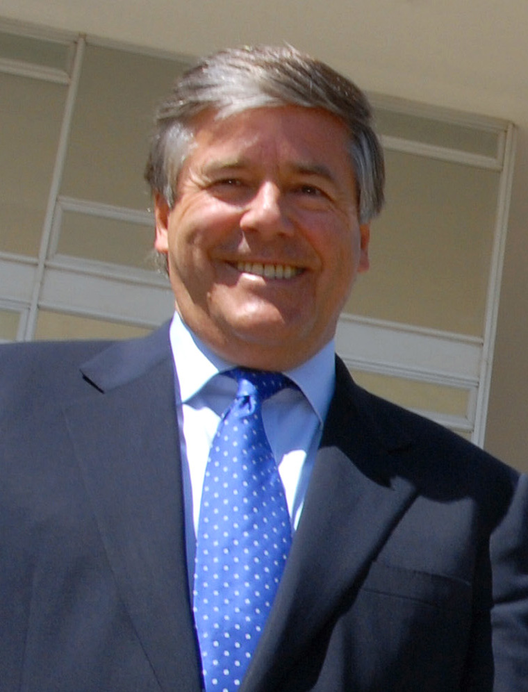 Brasília - O presidente mundial do Grupo Deutsche Bank, Josef Ackermann, fala aos jornalistas, após encontro com o presidente Luís Inácio Lula da Silva, no Palácio do Planalto.